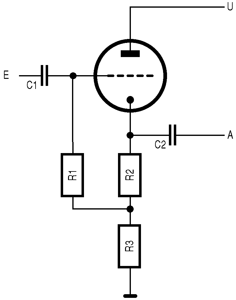 Prinzipschaltbild eines praxisnahen Kathodenfolgers